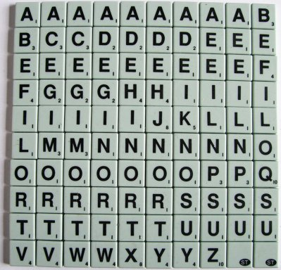 scrabble board game full 100 tile set